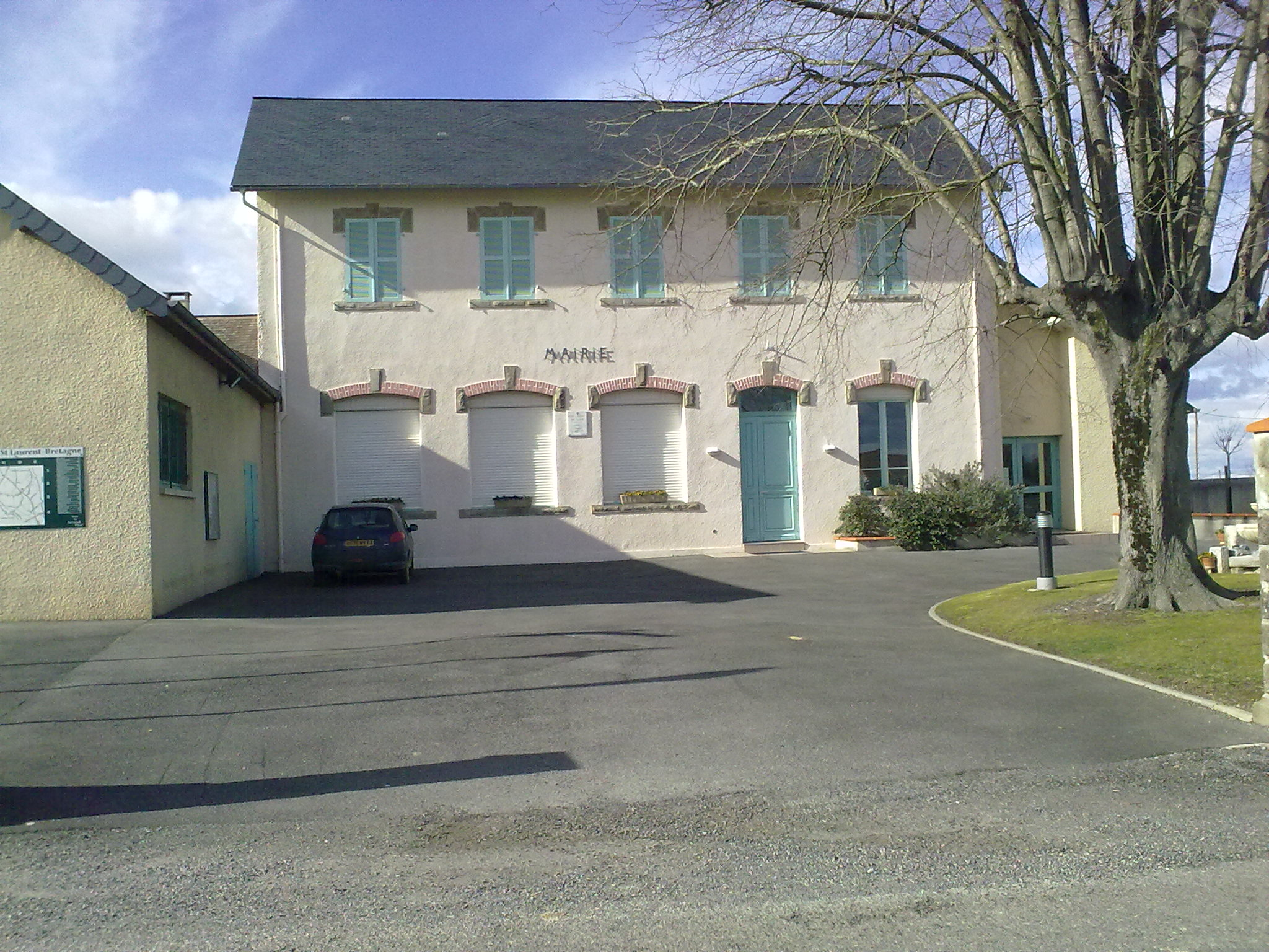 Mairie de Saint-Laurent-Bretagne